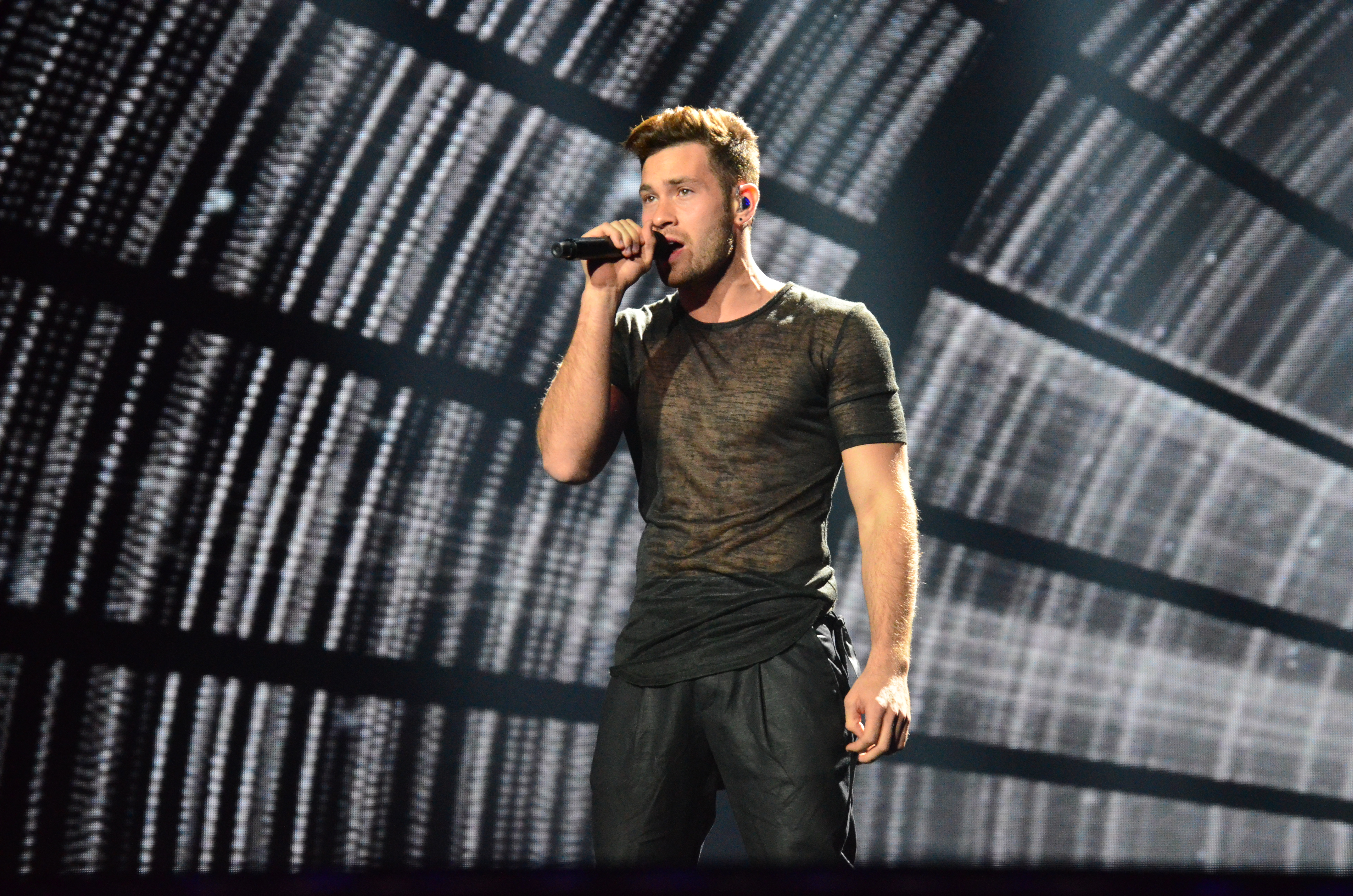 12 травня. Генеральна репетиція фіналу Євробачення 2017. IMRI (Israel)